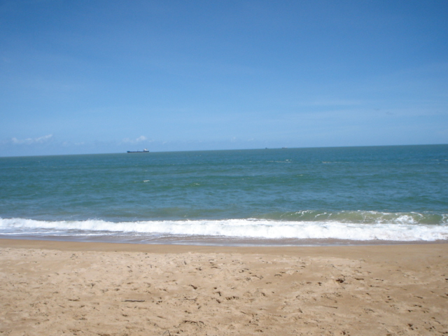 Regência, Cidade de Linhares, Espírito Santo, Brasil.